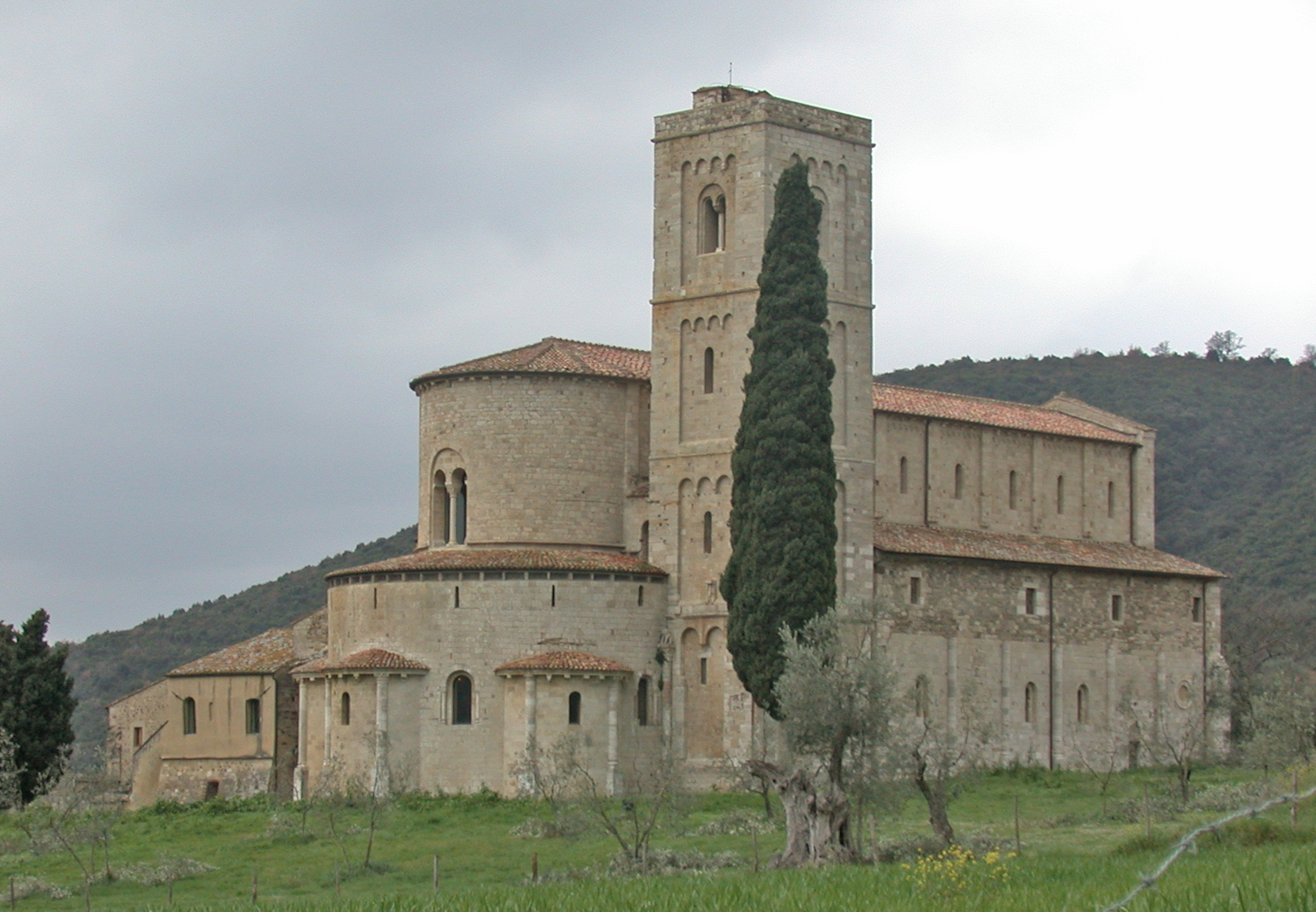 Italia, Toscana, provincia di Siena, Montalcino, Abbazia di Sant'Antimo, vista panoramica dal lato dell'abside